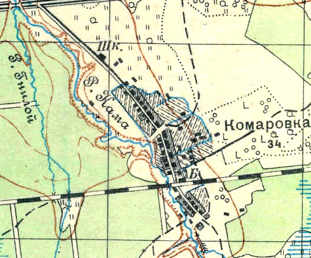 Топографическая карта Ленинградской области, квадрат О-35-21-Г-в (Комаровка), деревня Комаровка.